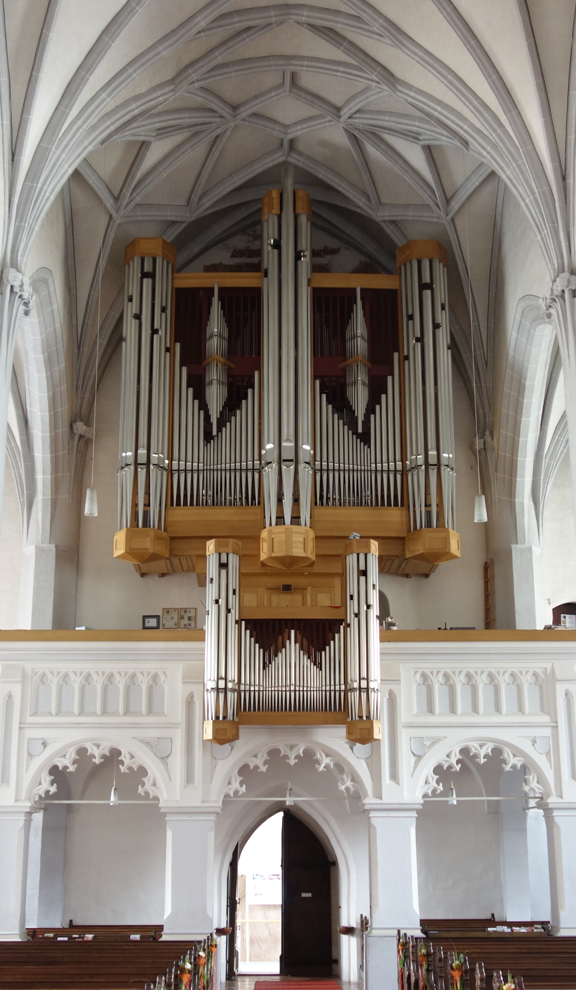 Orgel von Sankt Nikolaus und Stephanus in Eggenfelden (1997, Klais Orgelbau, III/44)